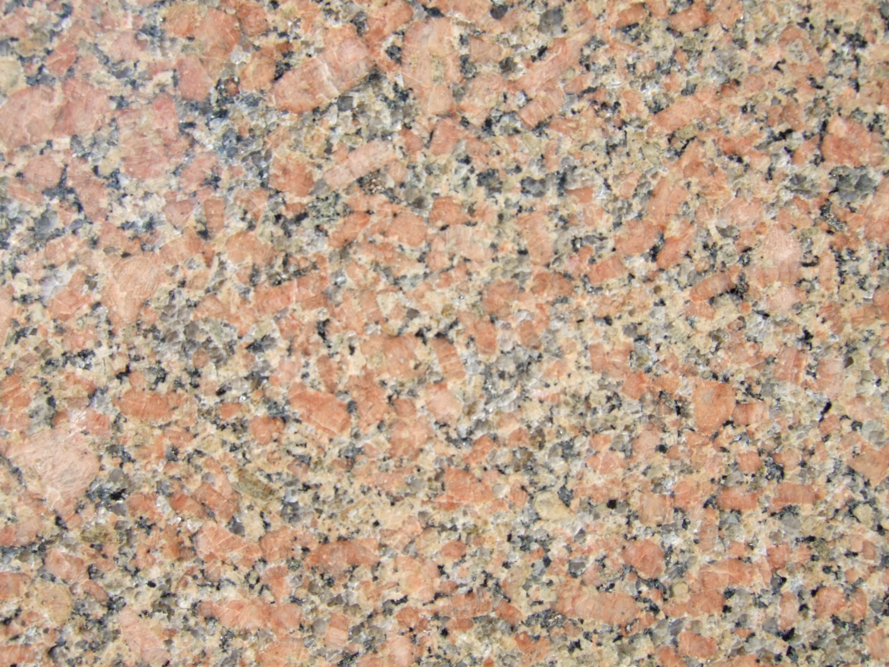 Fjære granite, Variant 2